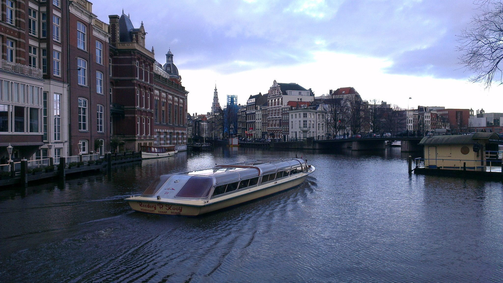 Речное судно в Амстердаме